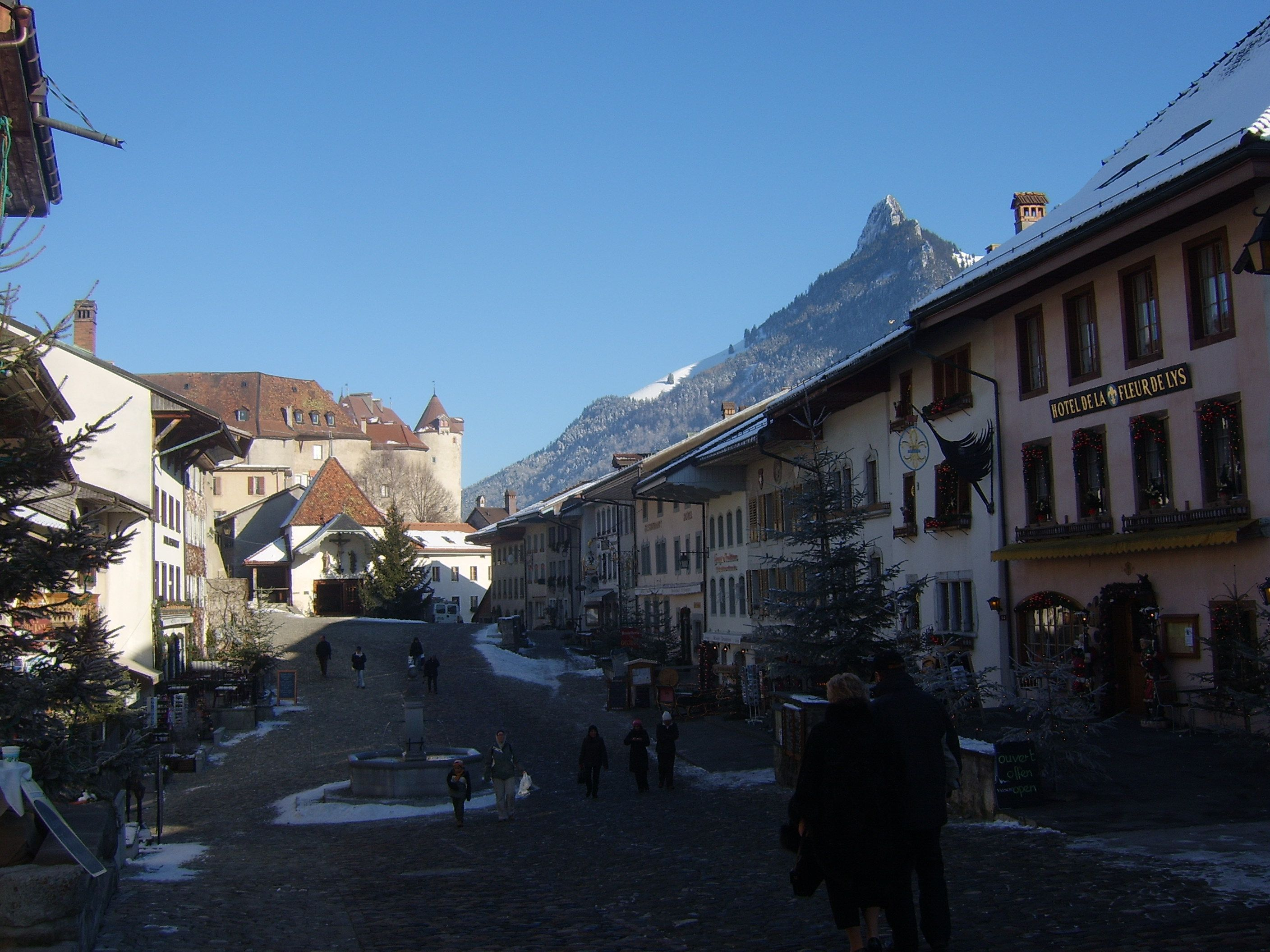 Gruyeres dziedziniec podzamcza